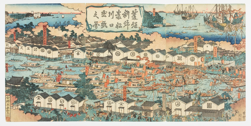 含粋亭芳豊/画『菱垣新綿番船川口出帆之図』、錦絵。大阪市立図書館蔵。